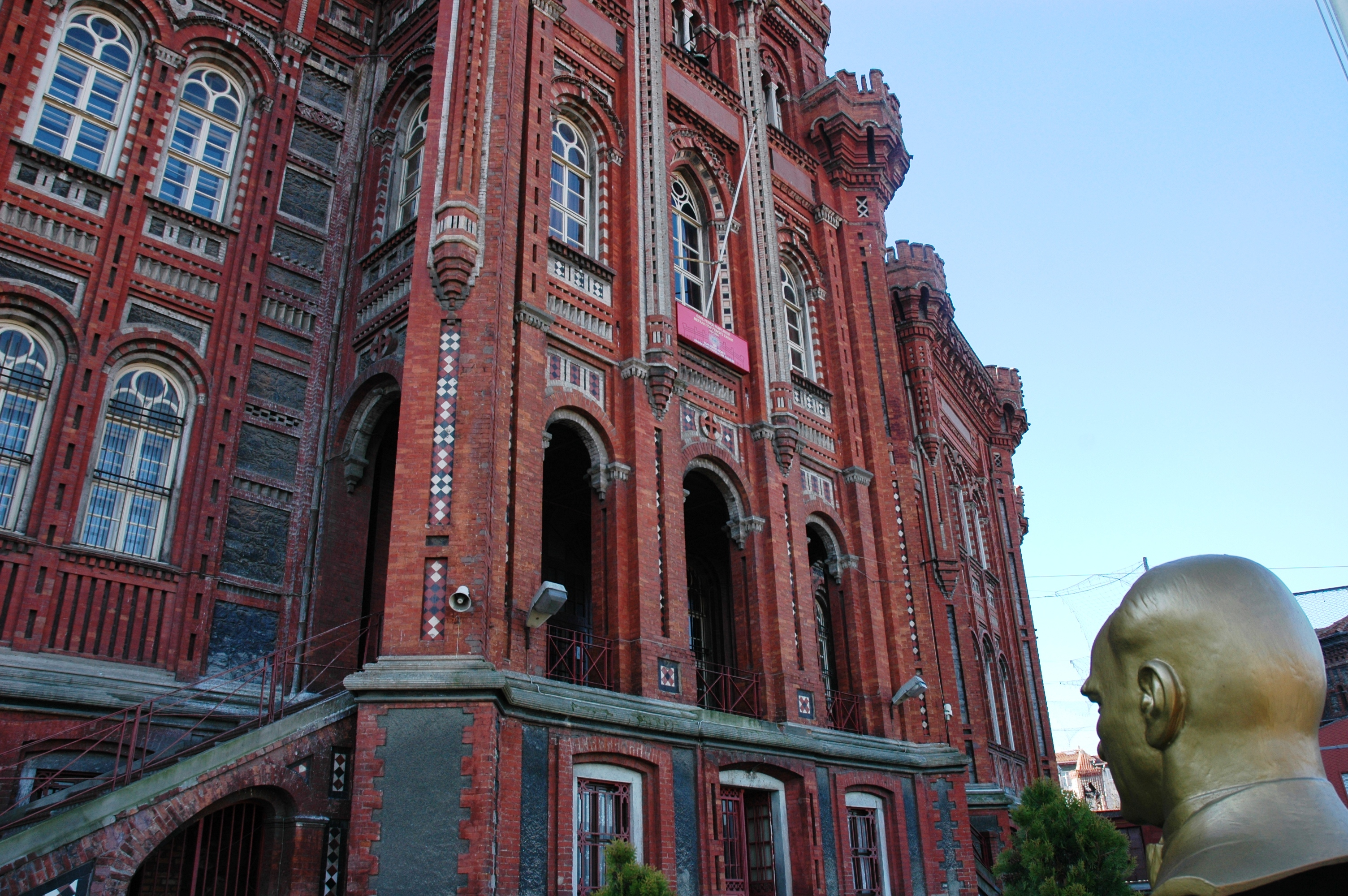 Universitat ortodoxa grega de Fener - Entrada